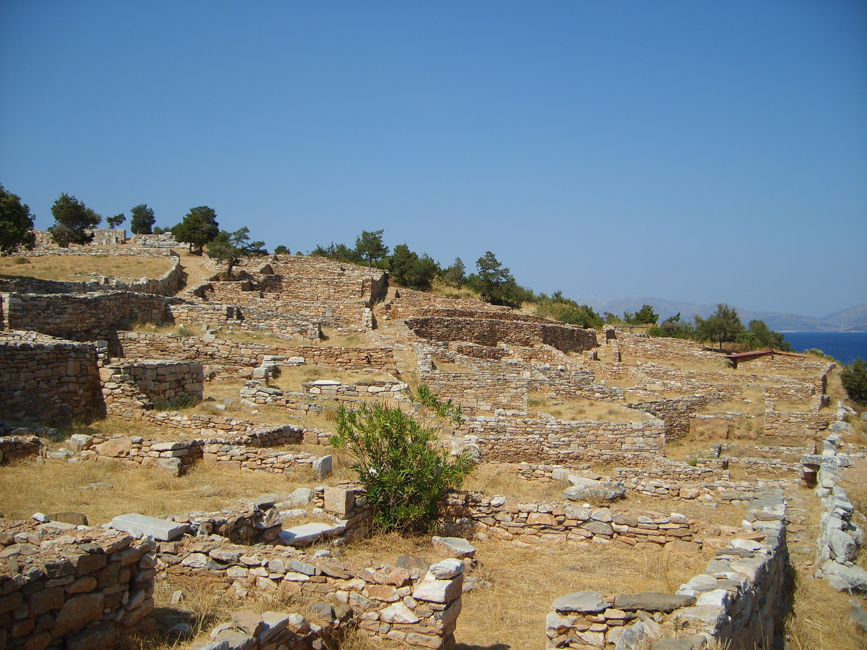 Ramnous (vue rapprochée du site archéologique)